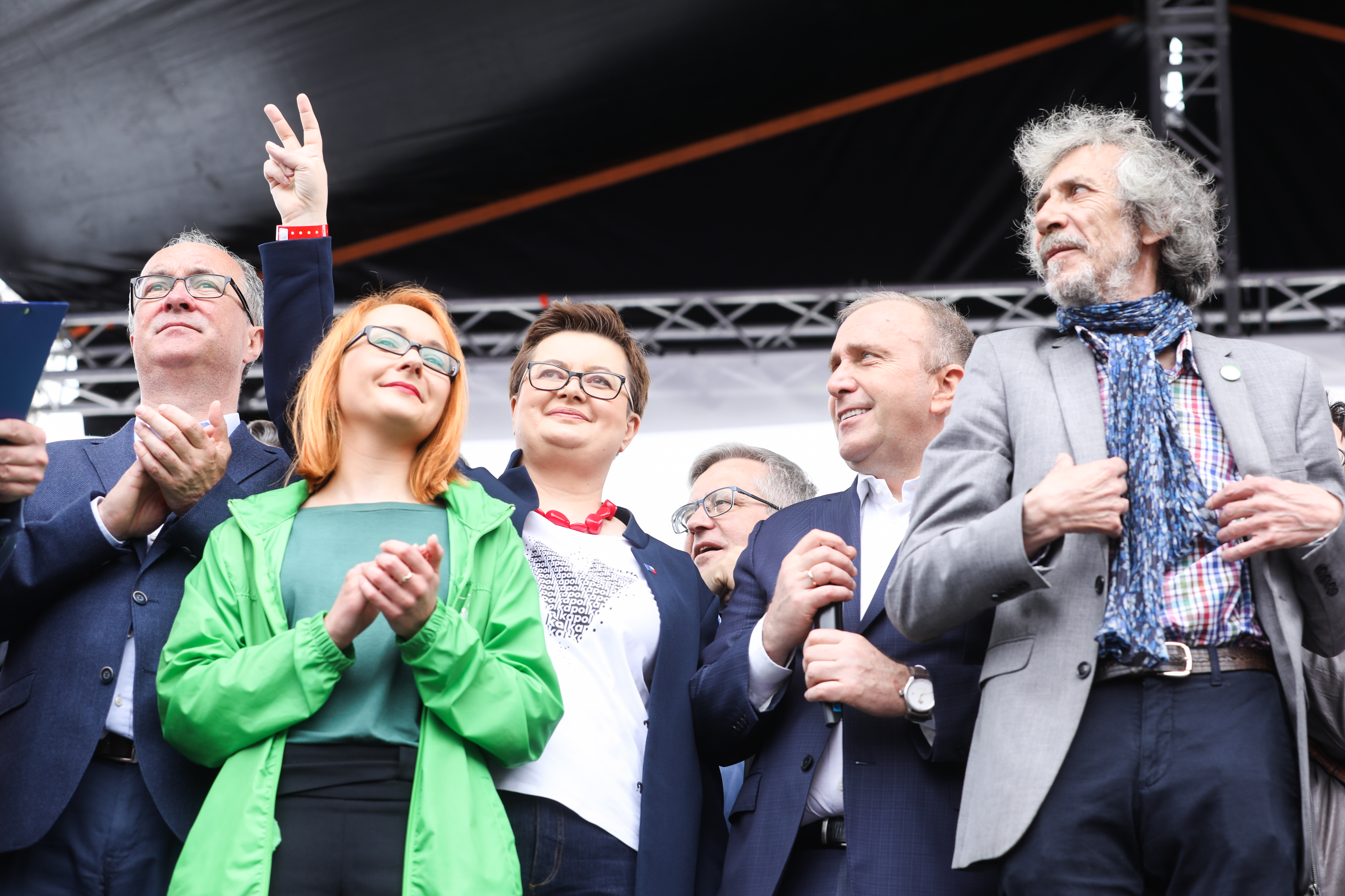 Czworo liderów Koalicji Europejskiej.